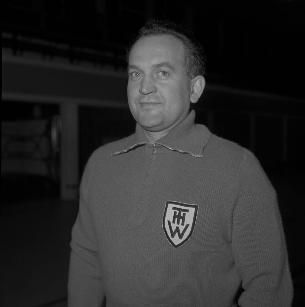 Betreuer der Handball-Mannschaft des des THW Kiel in der Saison 1964/65.